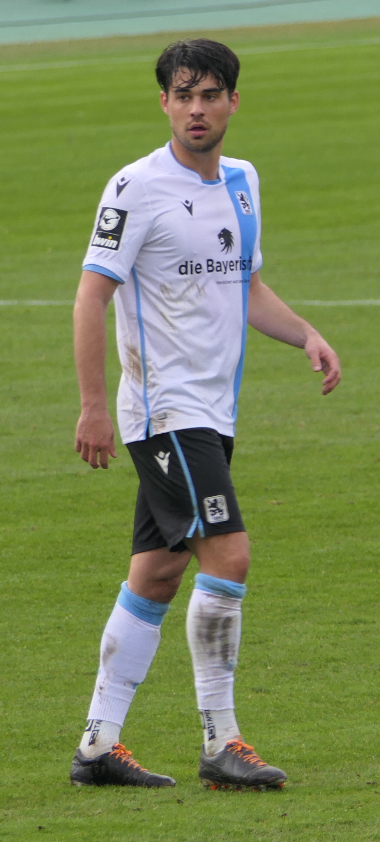 Der Fussballprofi Aaron Berzel im Trikot vom TSV 1860 München beim Heimspiel gegen Eintracht Braunschweig am 26.01.2020.